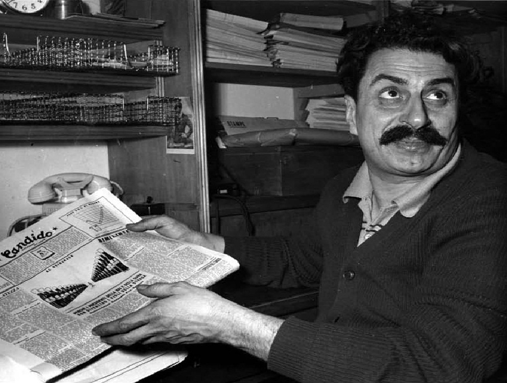 Milano, 1950. Giovannino Guareschi legge il Candido e mostra la vignetta satirica di Carletto Manzoni contro il Presidente della Repubblica Italiana Luigi Einaudi, a causa della quale fu processato e condannato con la condizionale a otto mesi di carcere.